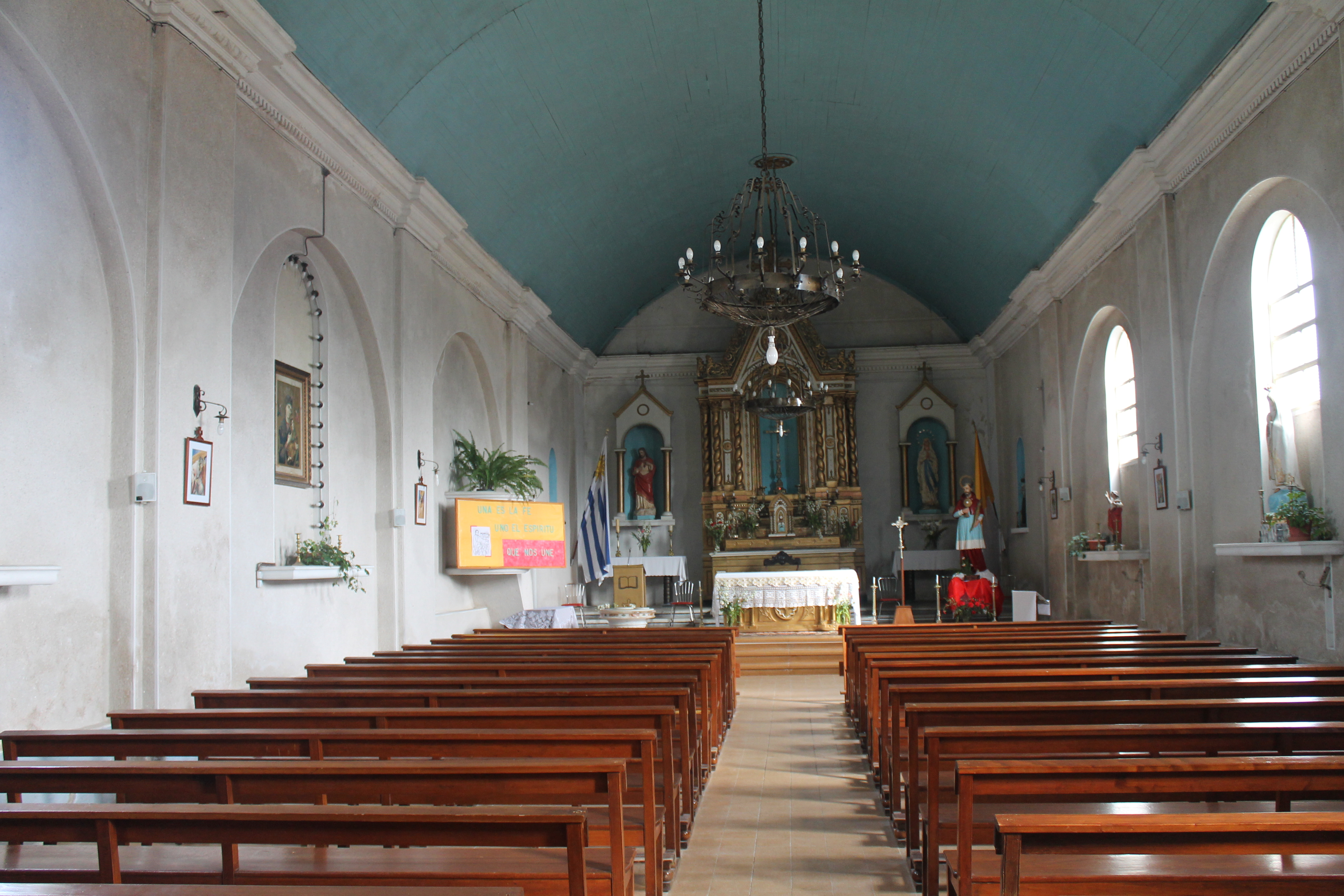 Parroquia de San Ramón. Ubicada en el departamento de Canelones